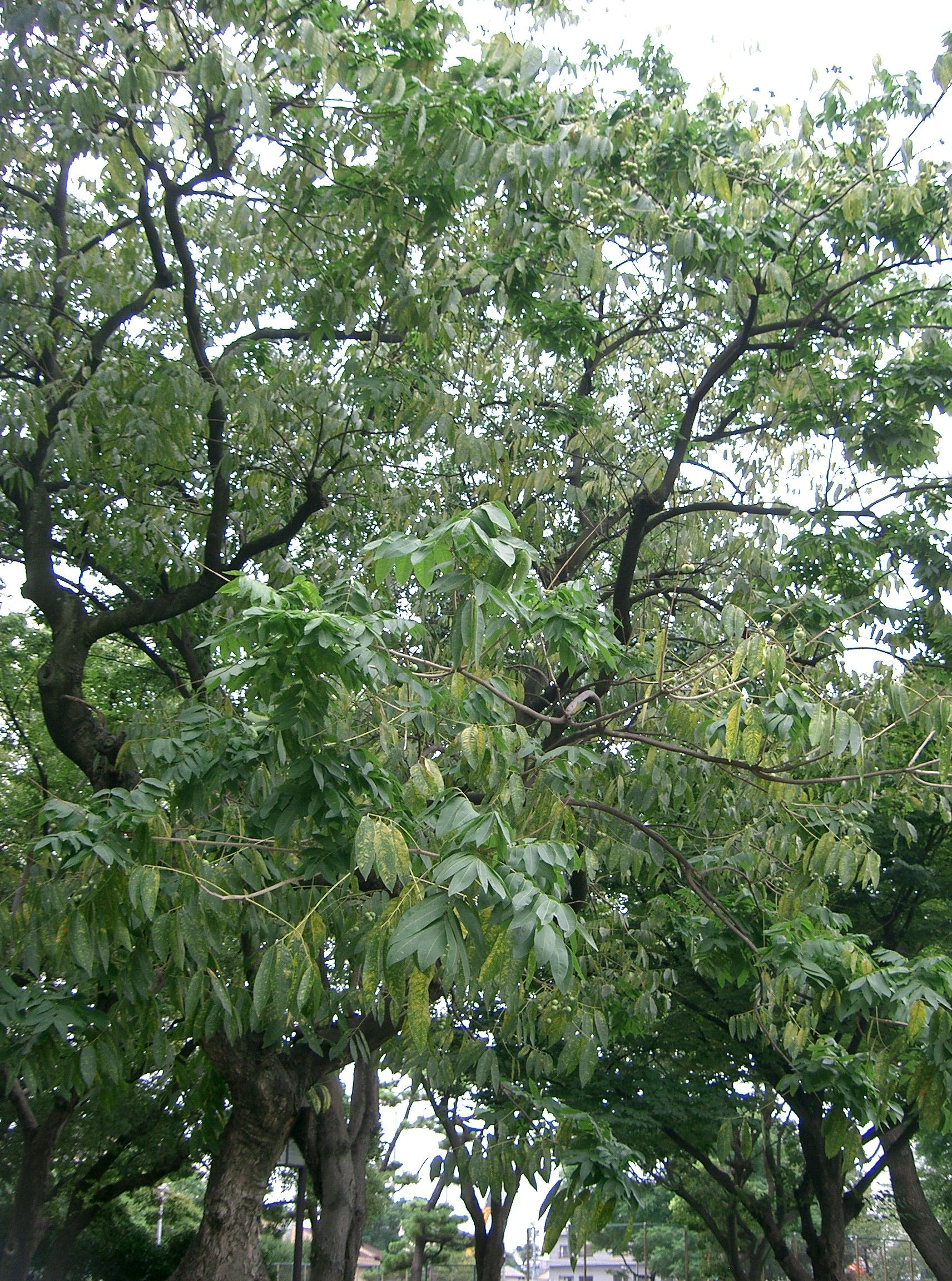 Sapindus mukorossi